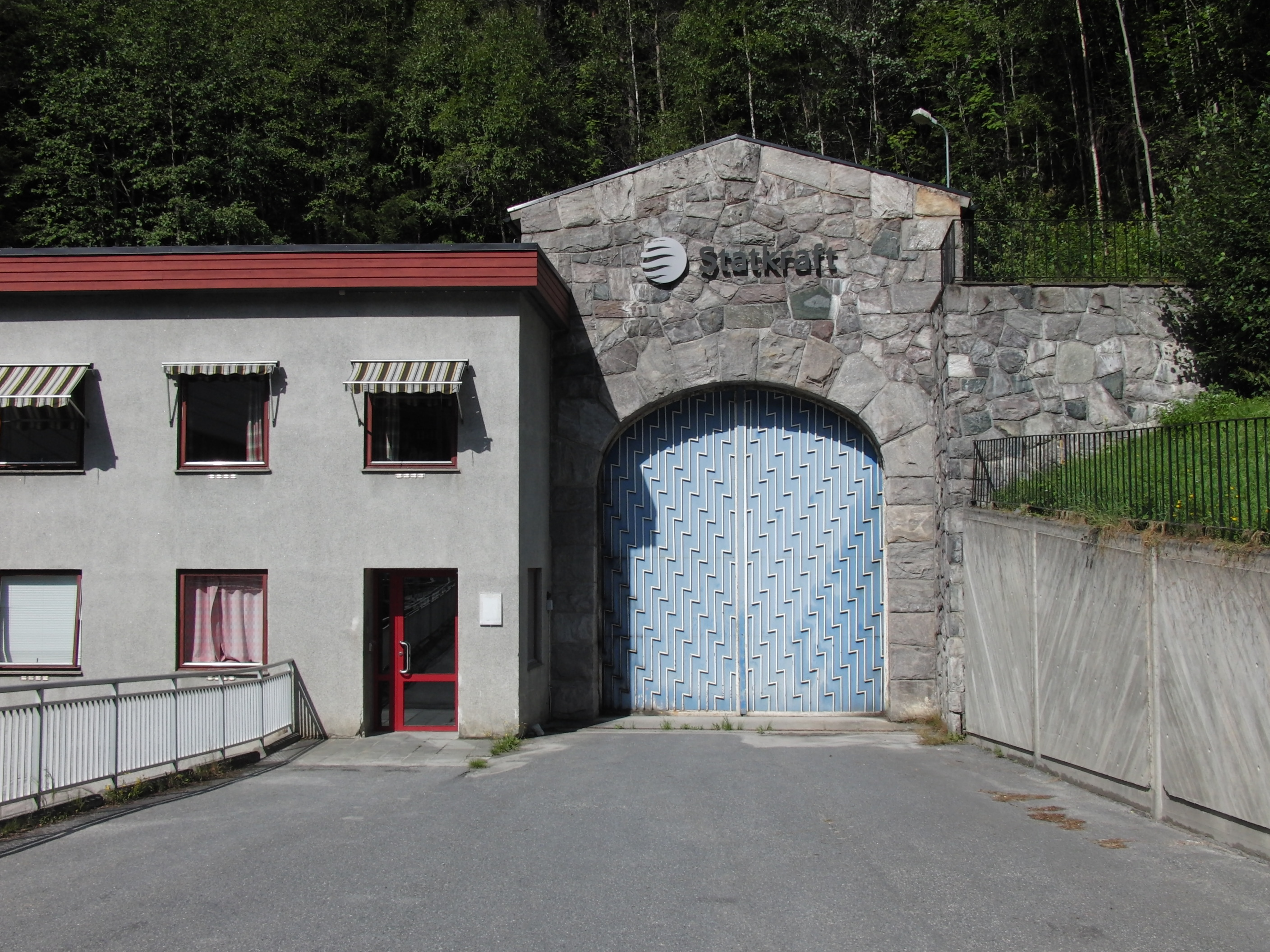 Mår kraftverk, August 2014